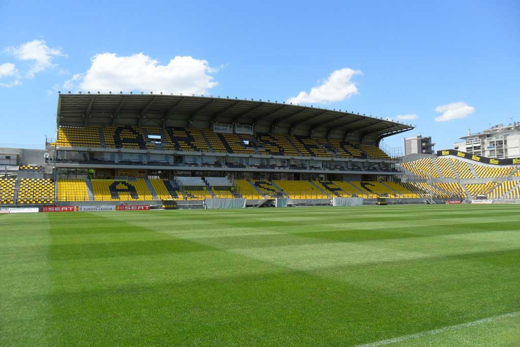 Kleanthis Vikelidis Stadium